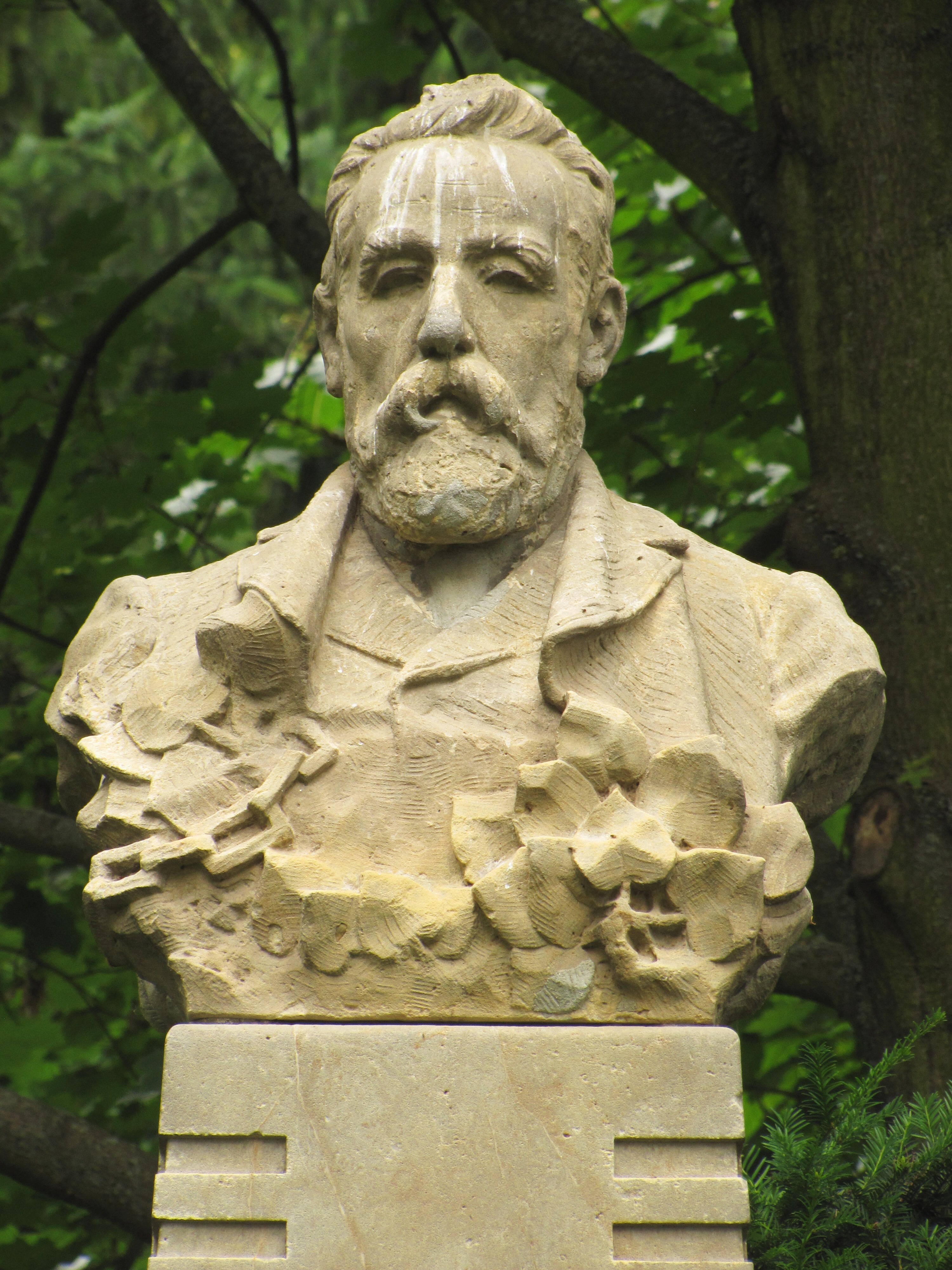 Pomník Svatopluka Čecha z roku 1912 v městském parku v Kyjově od kyjovského kameníka a sochaře Rudolfa Petra (1887–1956)